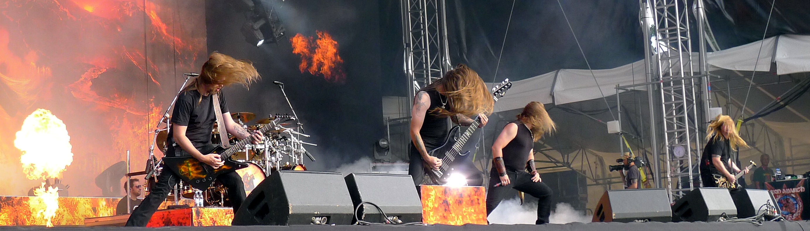 Amon Amarth live am Tuska Open Air 2011